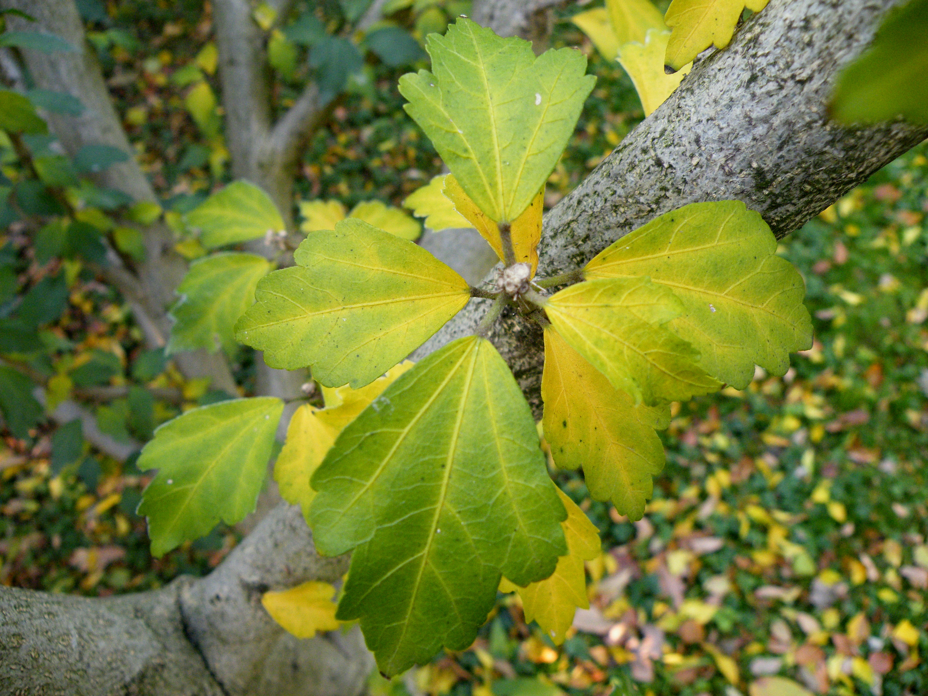 Српски (ћирилица): Листопадни жбун висине до 5 метара. Цвета од јуна до септембра. This media file is produced by Wikipedian in Residence in Botanical Garden Jevremovac in 2015.